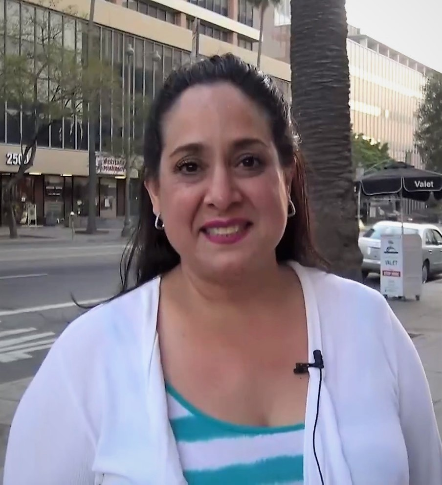 La comediante y actriz Gloria Izaguirre sin censura nos enseña el arte del kamasutra by Dulce Osuna